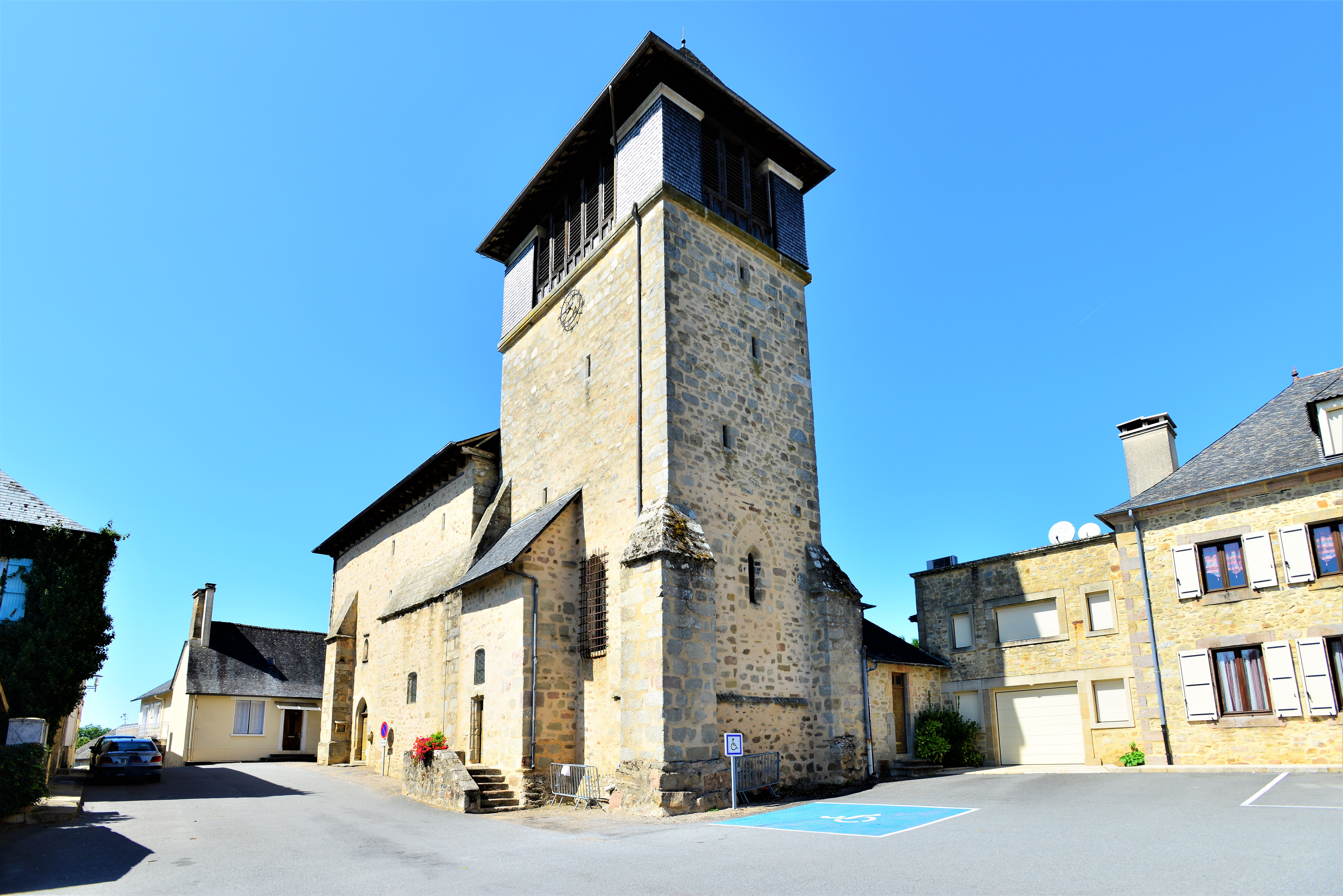 L'église de Saint-Germain-les-Vergnes du XIVe et XVe siècles, Corrèze, France.